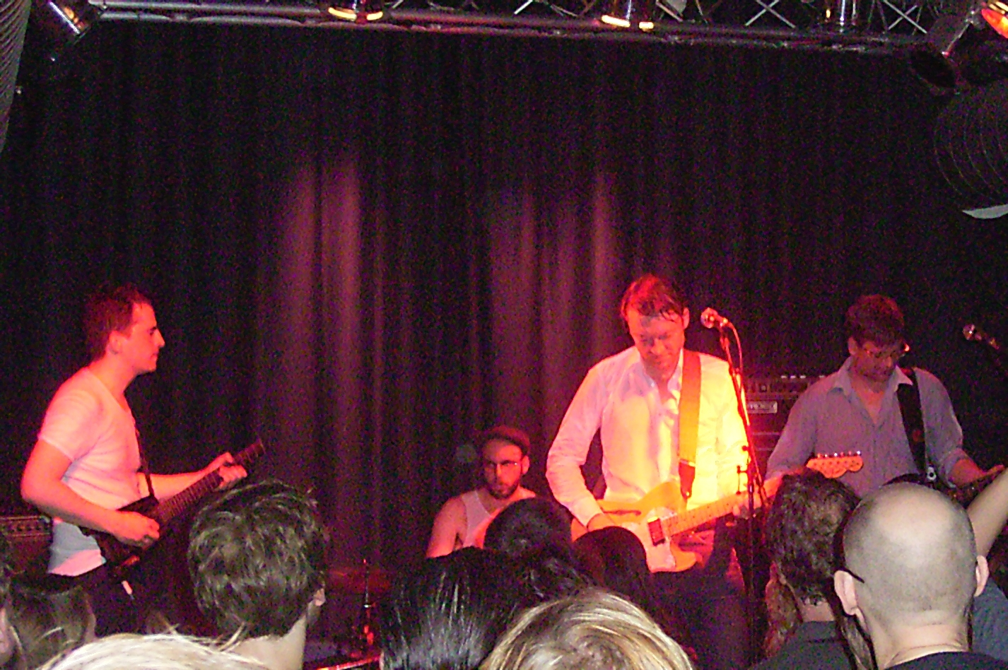 Jochen Distelmeyer & Band (Benny Thiel, dr; Lars Precht, b; ?, g) 16.07.2009, Essen, Grend